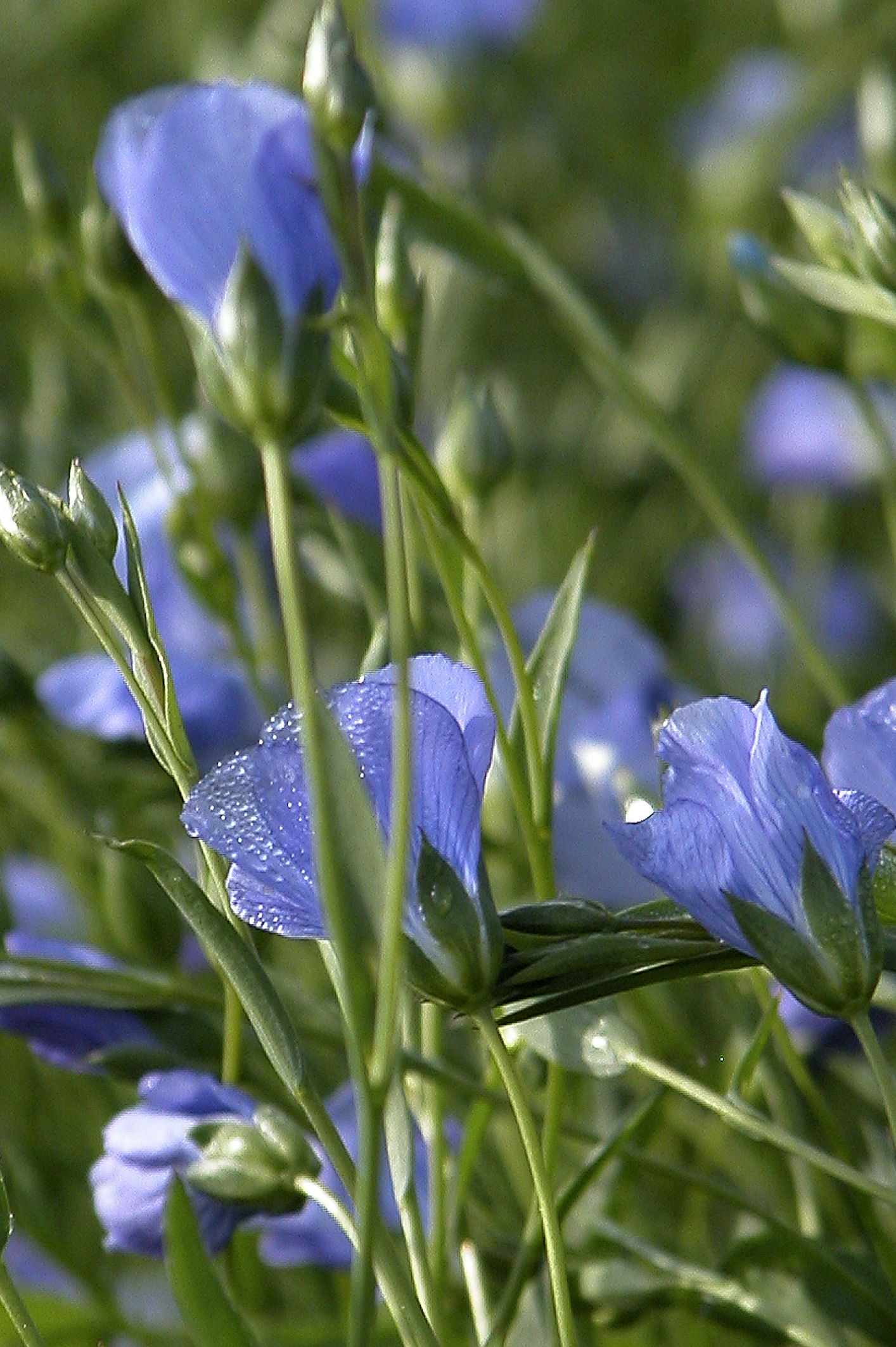 INRA, Jean Weber